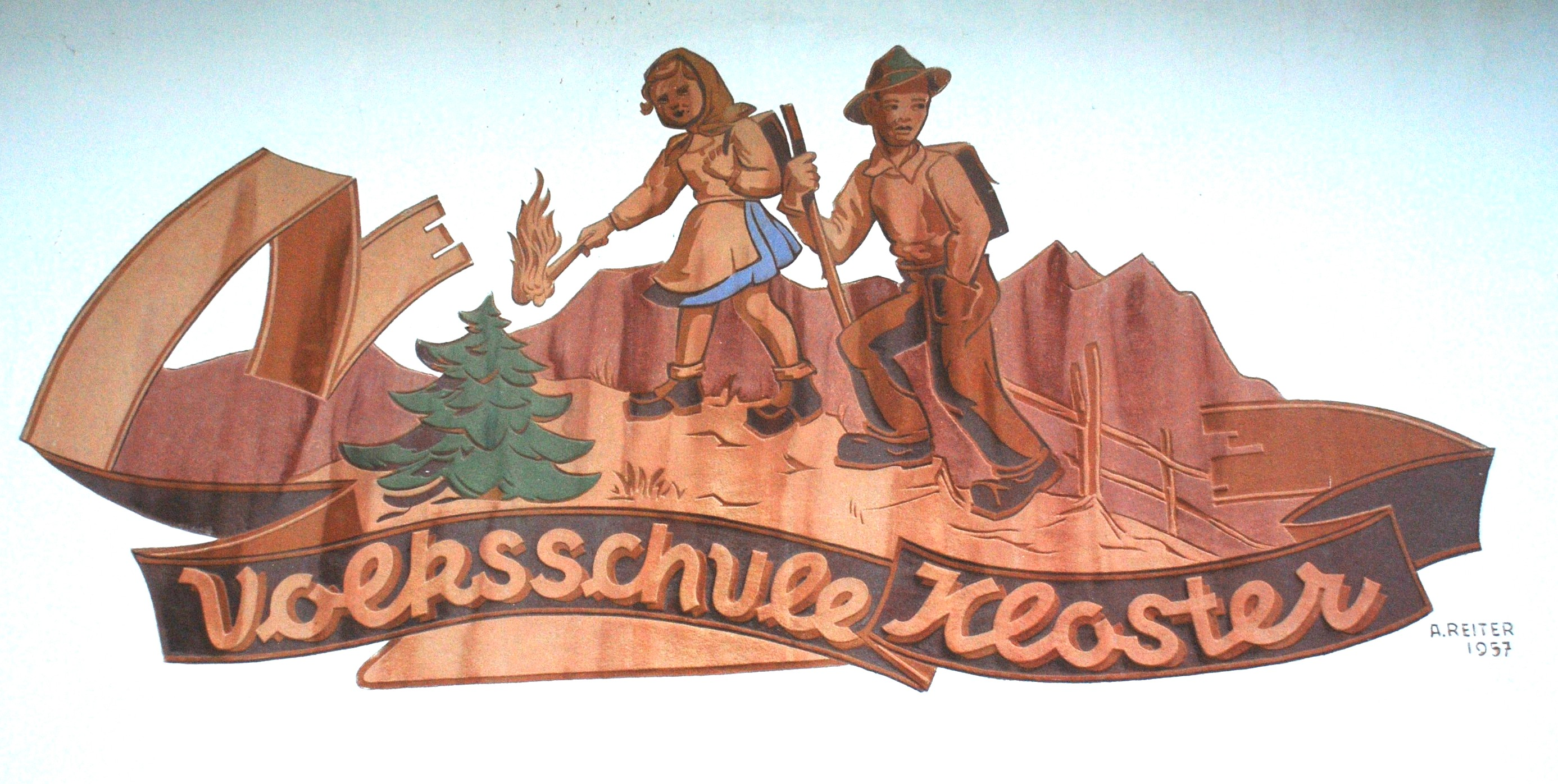 Schulweg1 Bergschulkinder VS Kloster